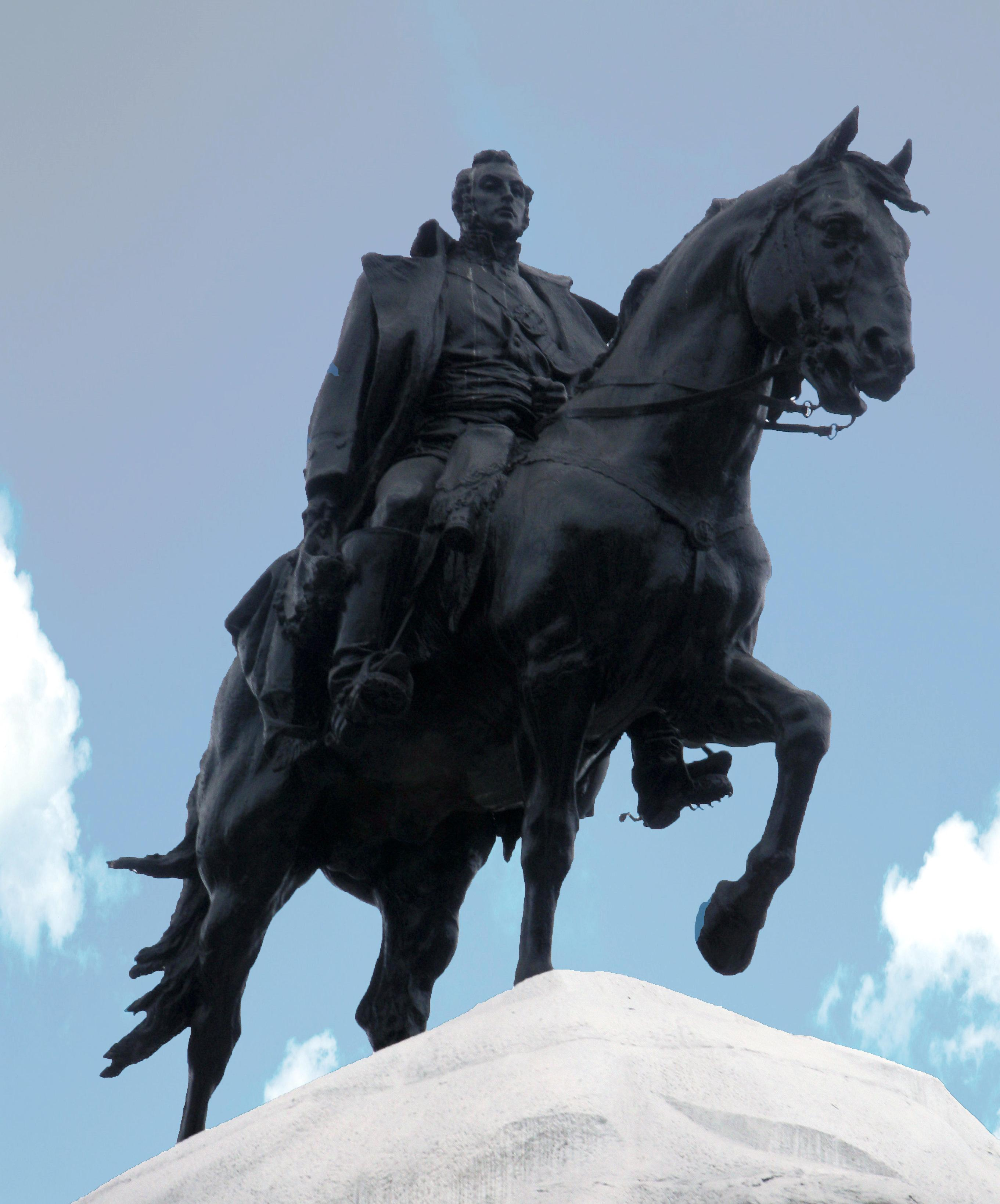 Monumento a San Martín - Plaza de San Martín, Lima